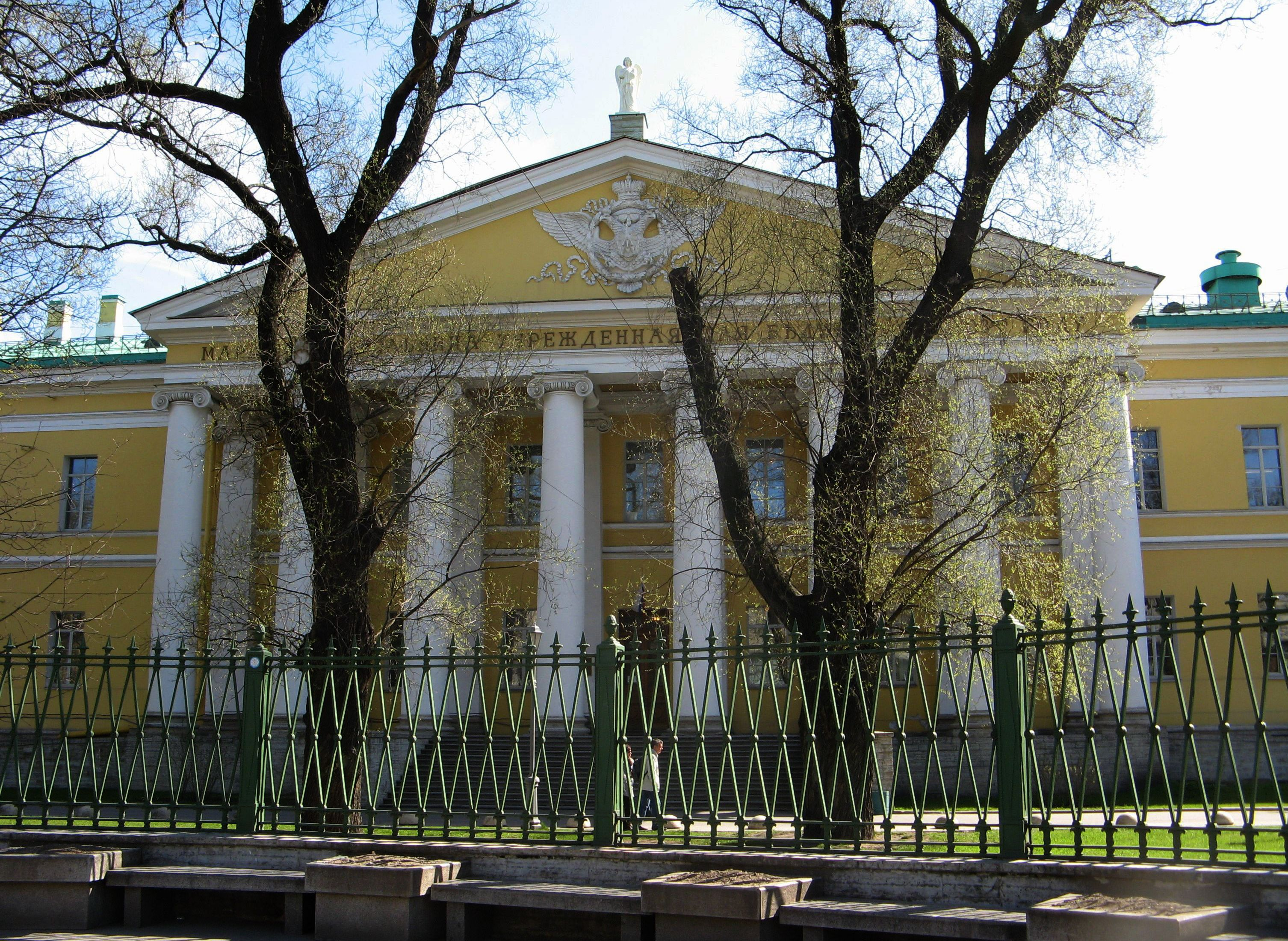 Больница Мариинская (Санкт-Петербург и Лен.область, Санкт-Петербург, Литейный проспект, 56)